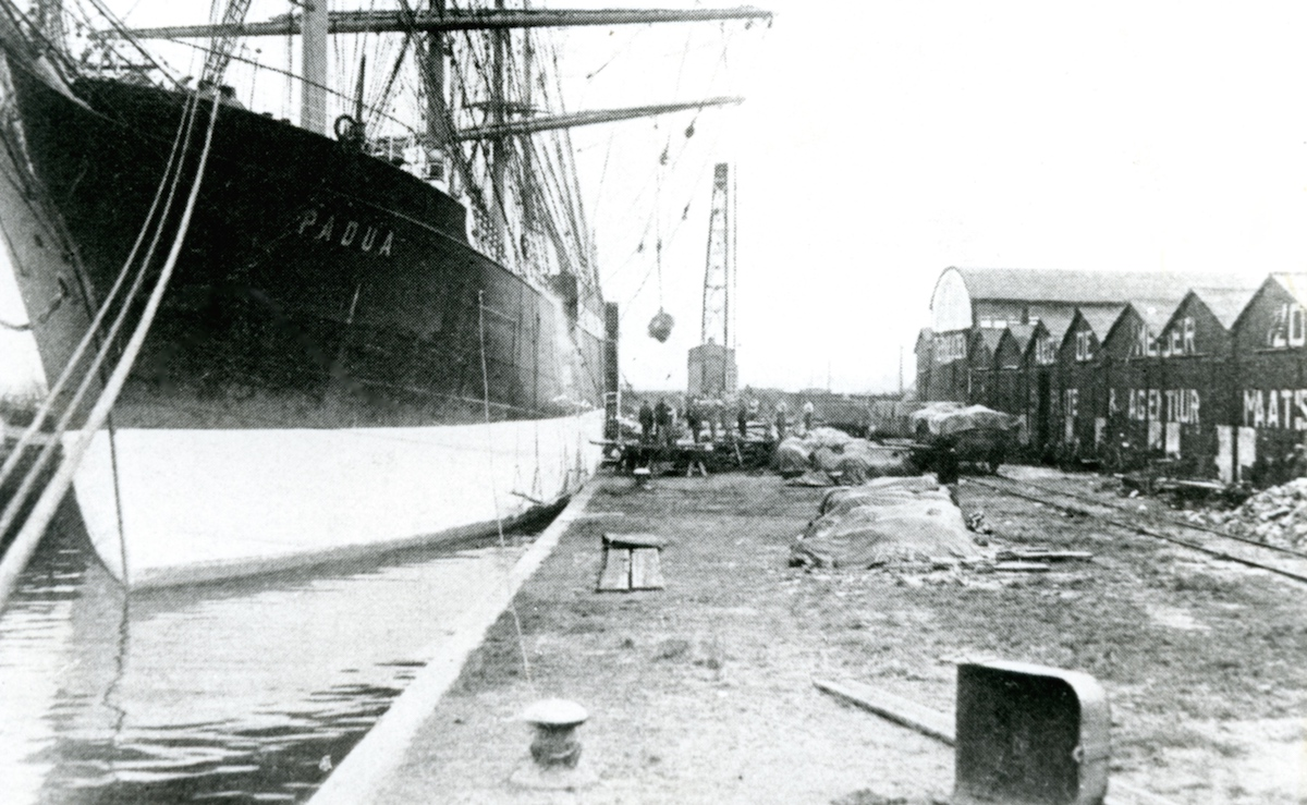 De Padua aan het Zuiddok te Terneuzen